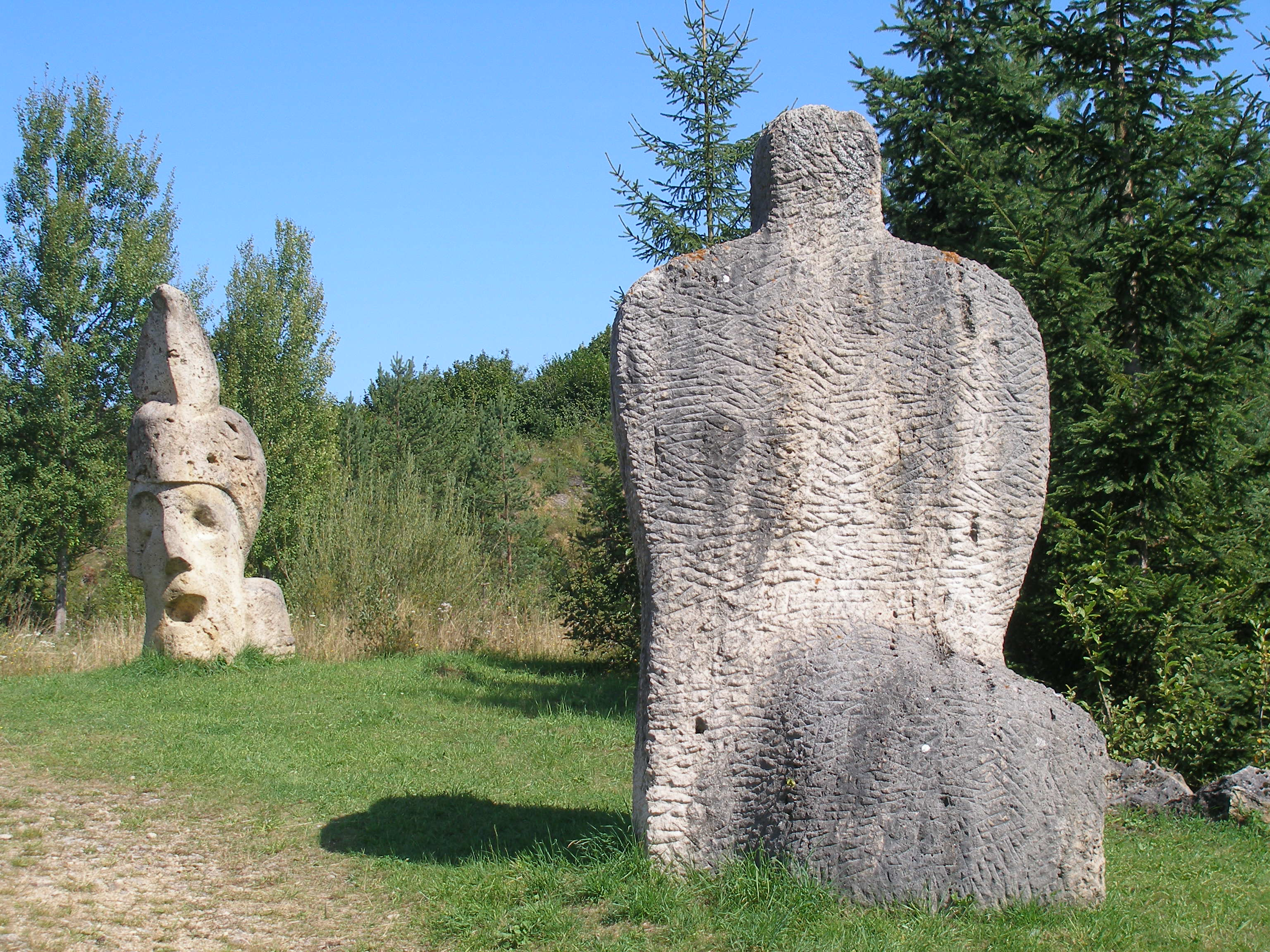 Sochy v Prírode. Kameňolom Vyšné Ružbachy. Okres Stará Ľubovňa.